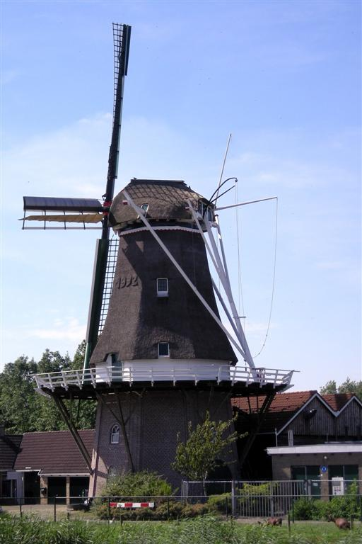 De Hoop, molen te Stiens